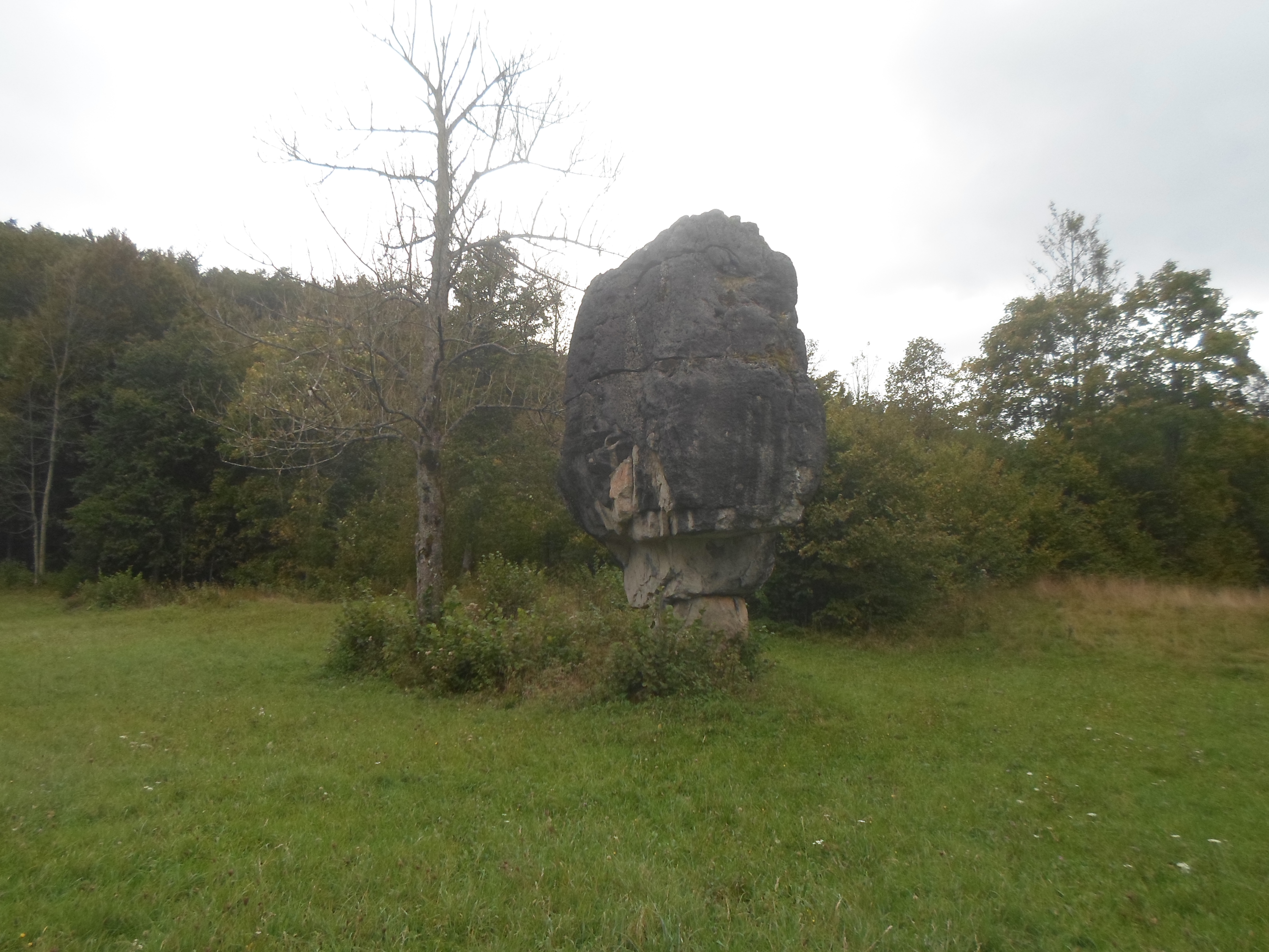 Stijena Visibaba